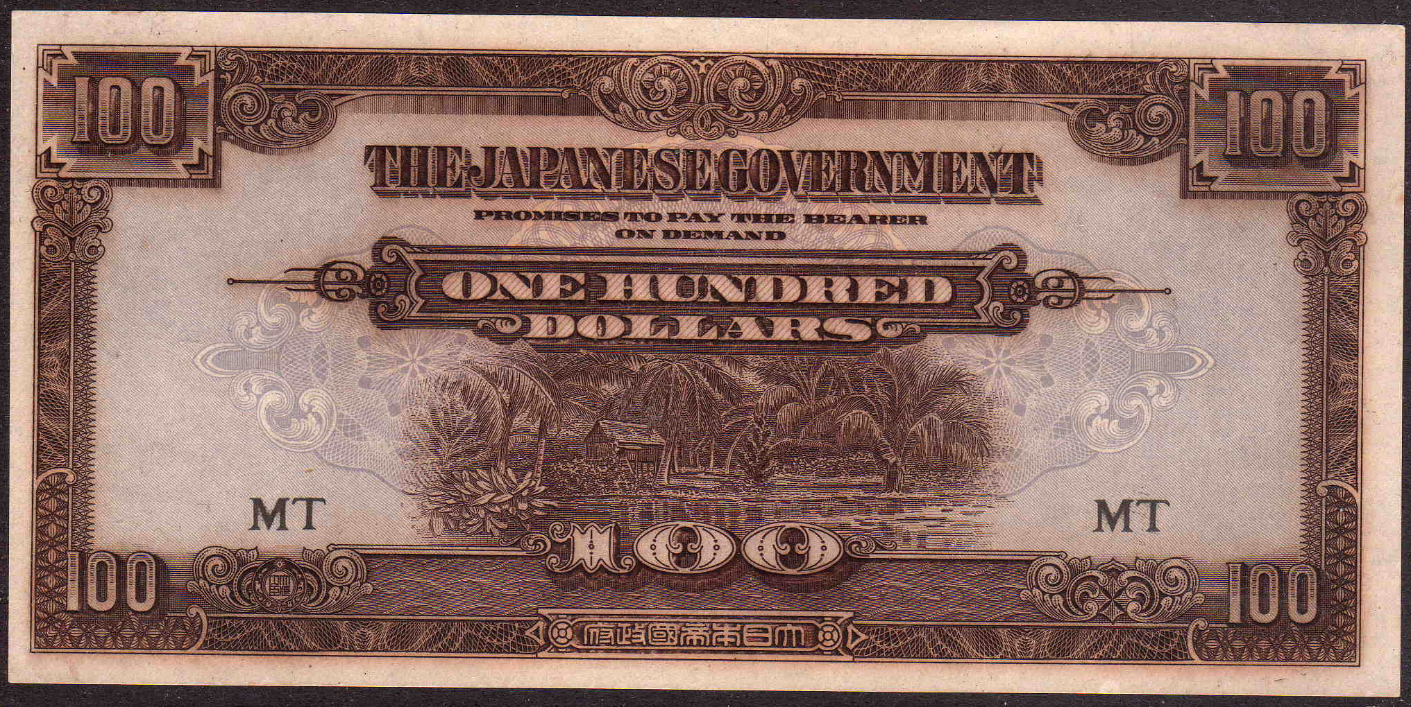 日本が第二次世界大戦中にイギリス植民地であったマレー半島で使用した100ドル軍票の表。初期生産分であり、印刷は凹版でなされている。